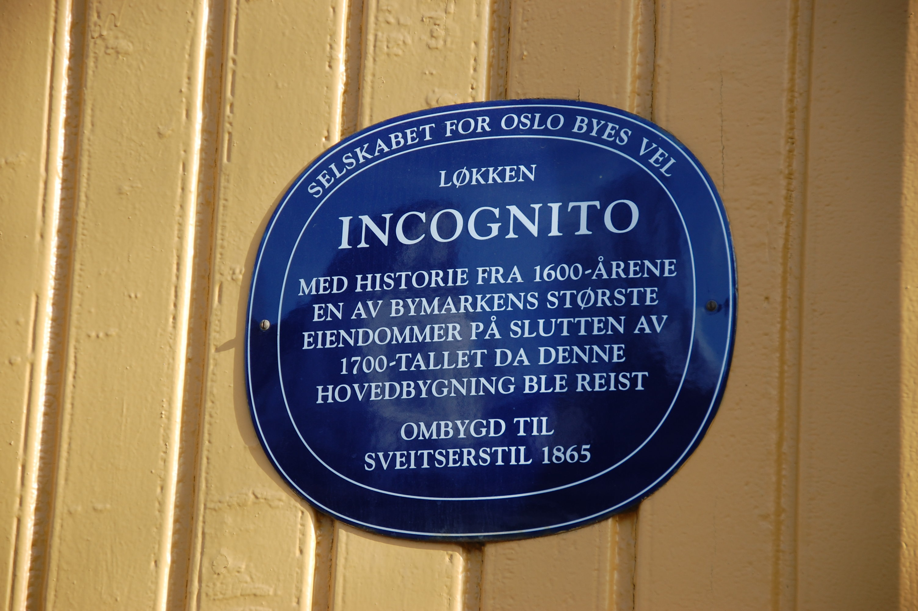 Kulturhistorisk skilt på Løkkebygningen Incognito, Parkveien 49